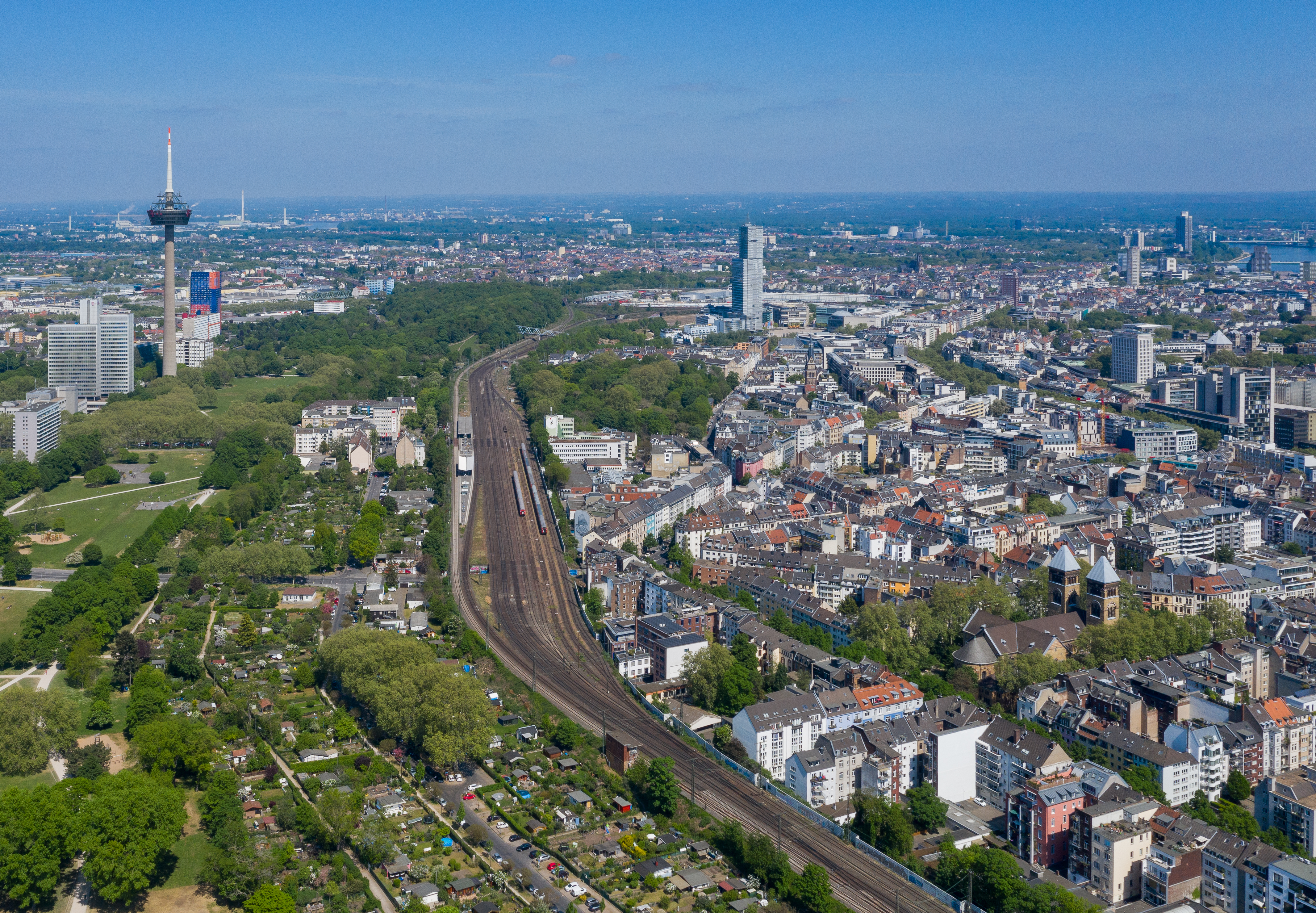 Kölner Eisenbahnring im Bereich Köln-West. Links: Fernsehturm Colonius, Mitte oben der KölnTurm im MediaPark